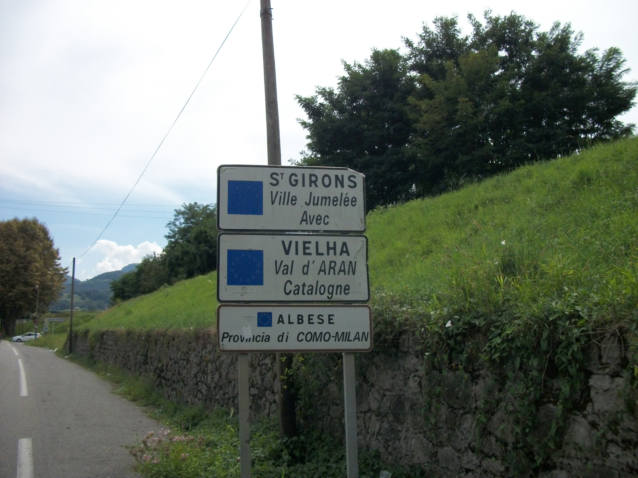 Saint-Girons jumelage